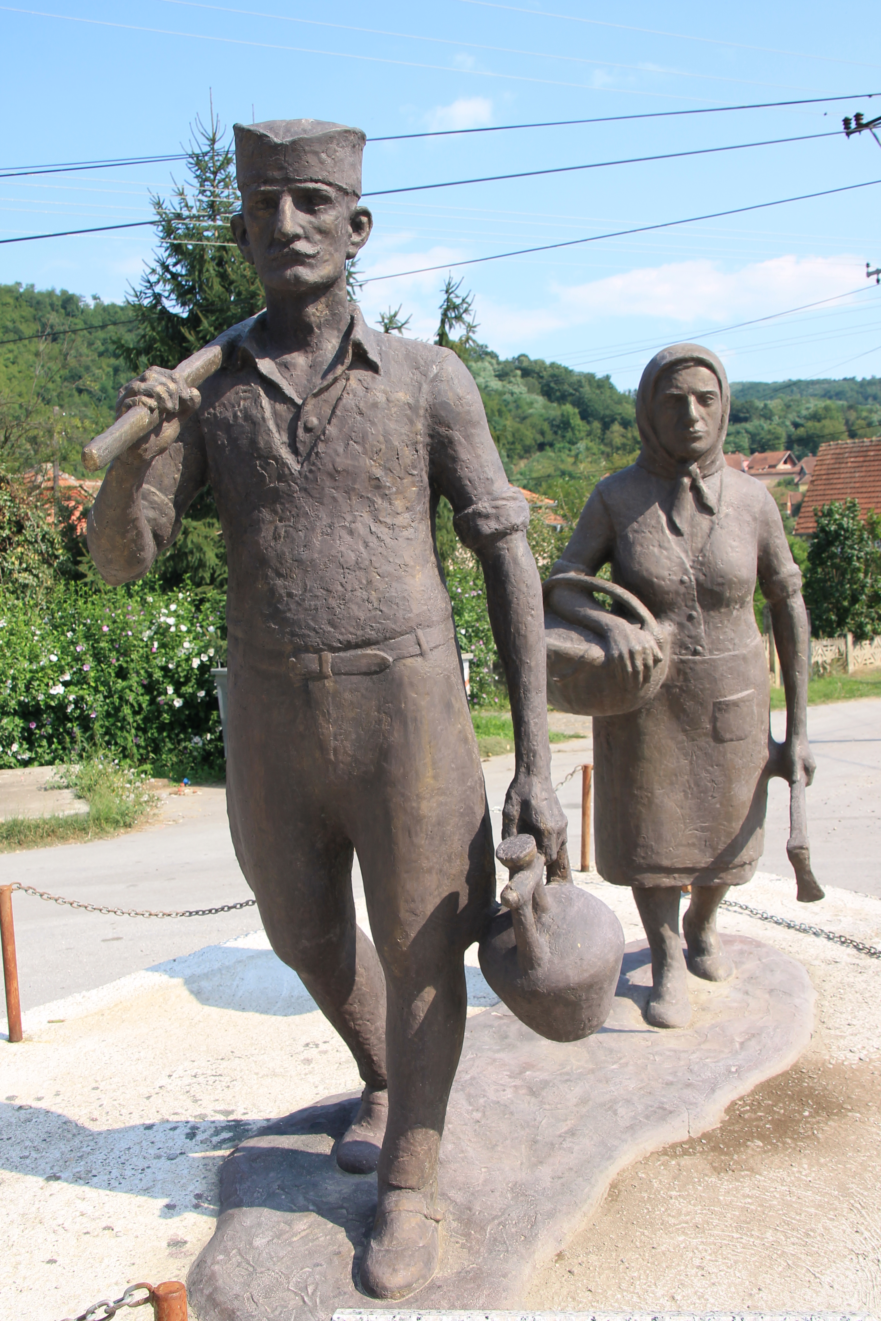 Spomenik srpskom seljaku